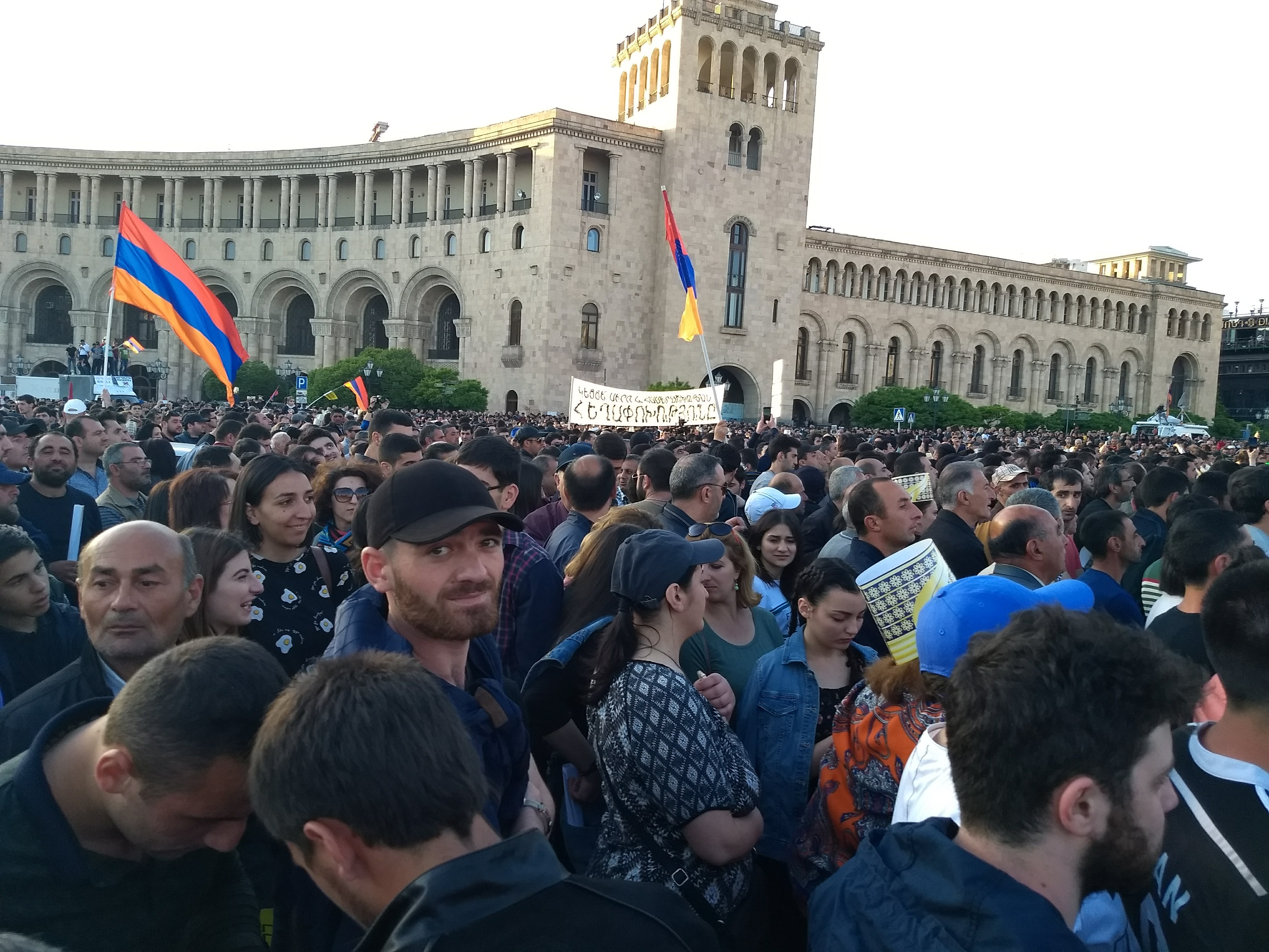 2018 Armenian Revolution